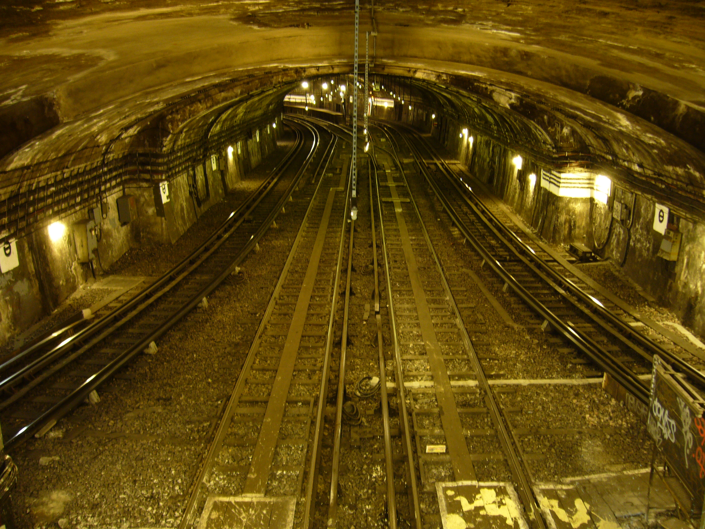 Le tunnel en sortie de la station Porte de Charenton sur la ligne 8 du métro de Paris.